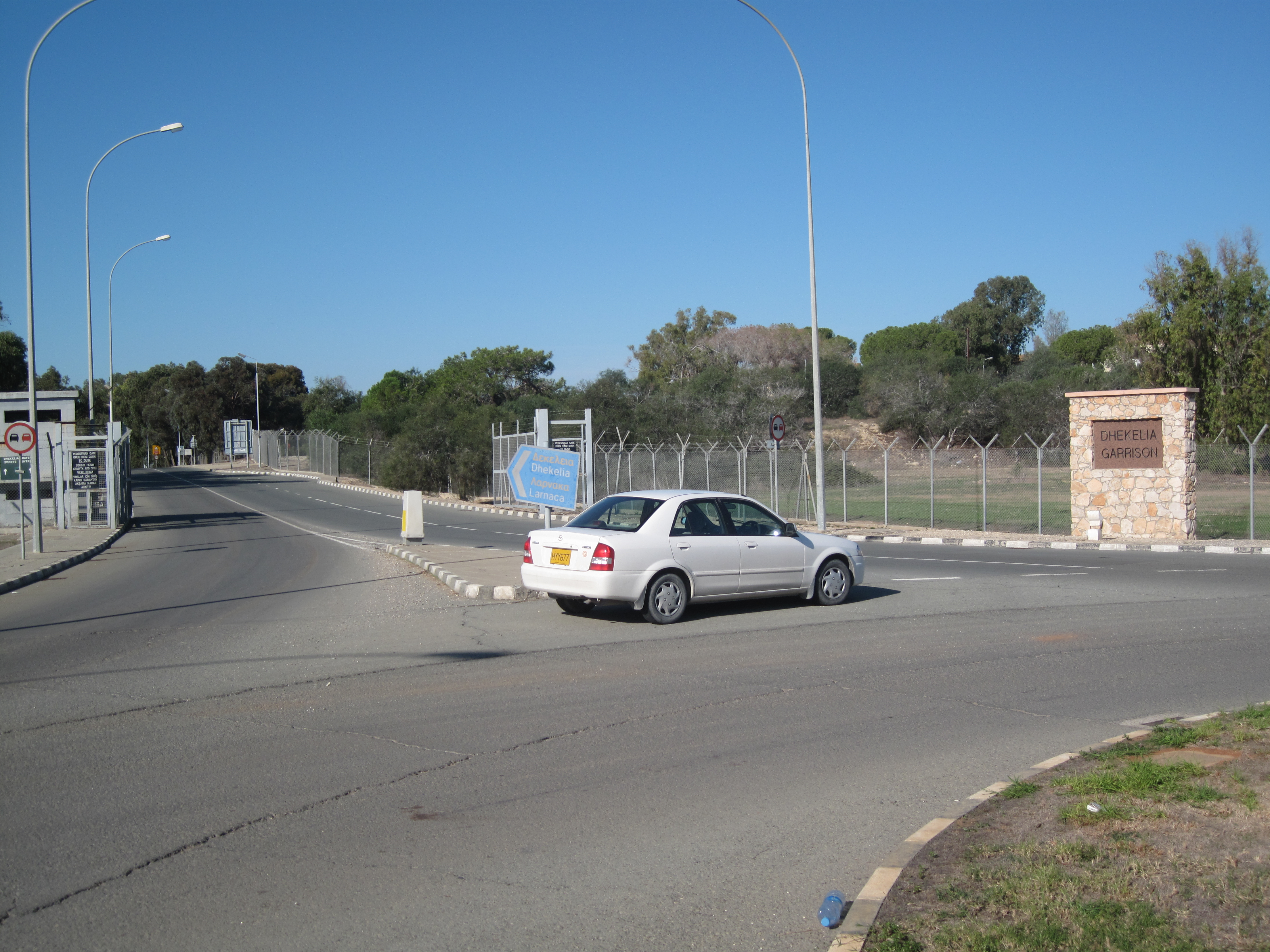 dhekelia